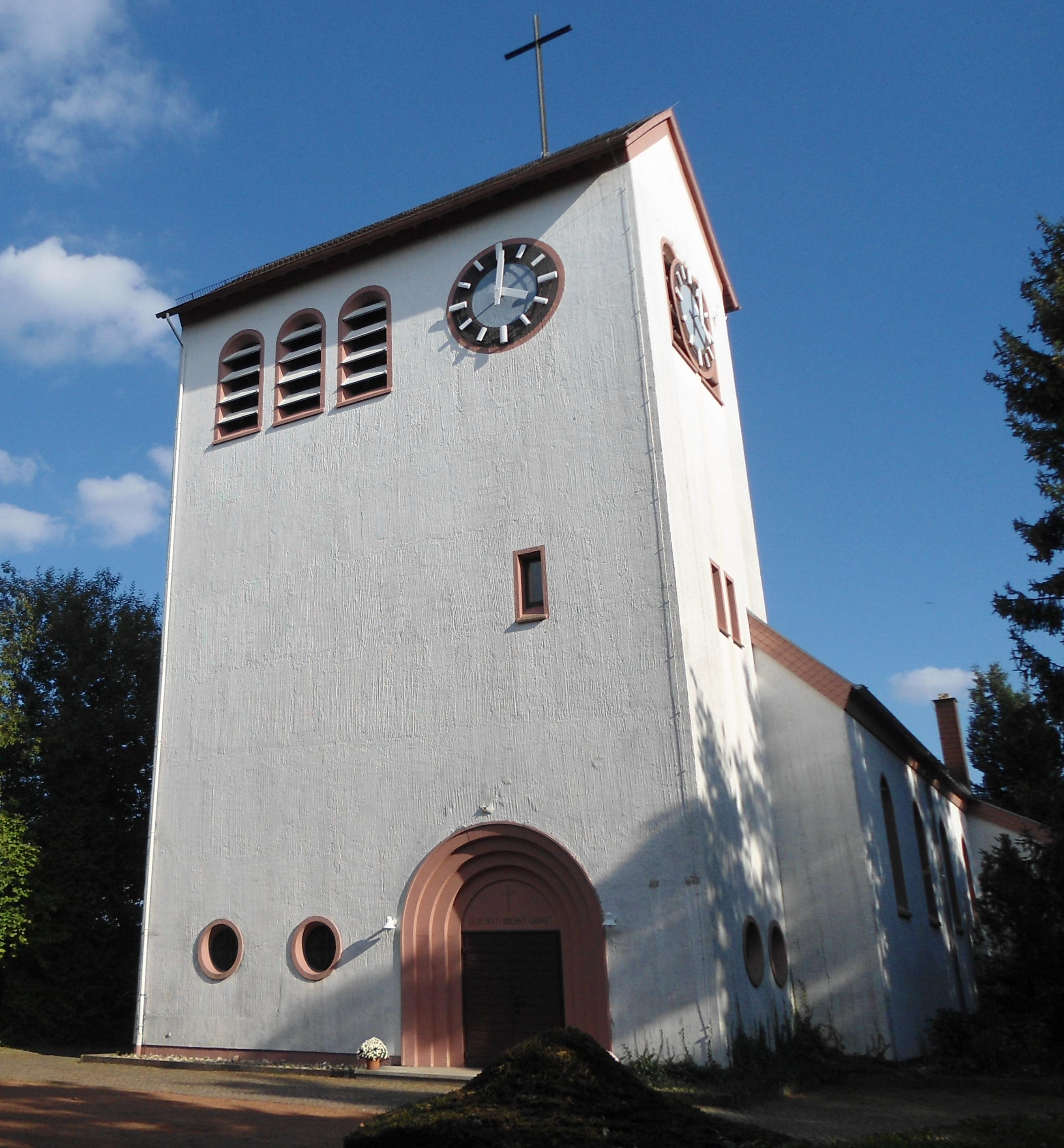 Die evangelische Christuskirche in Rohrbach (Saar)